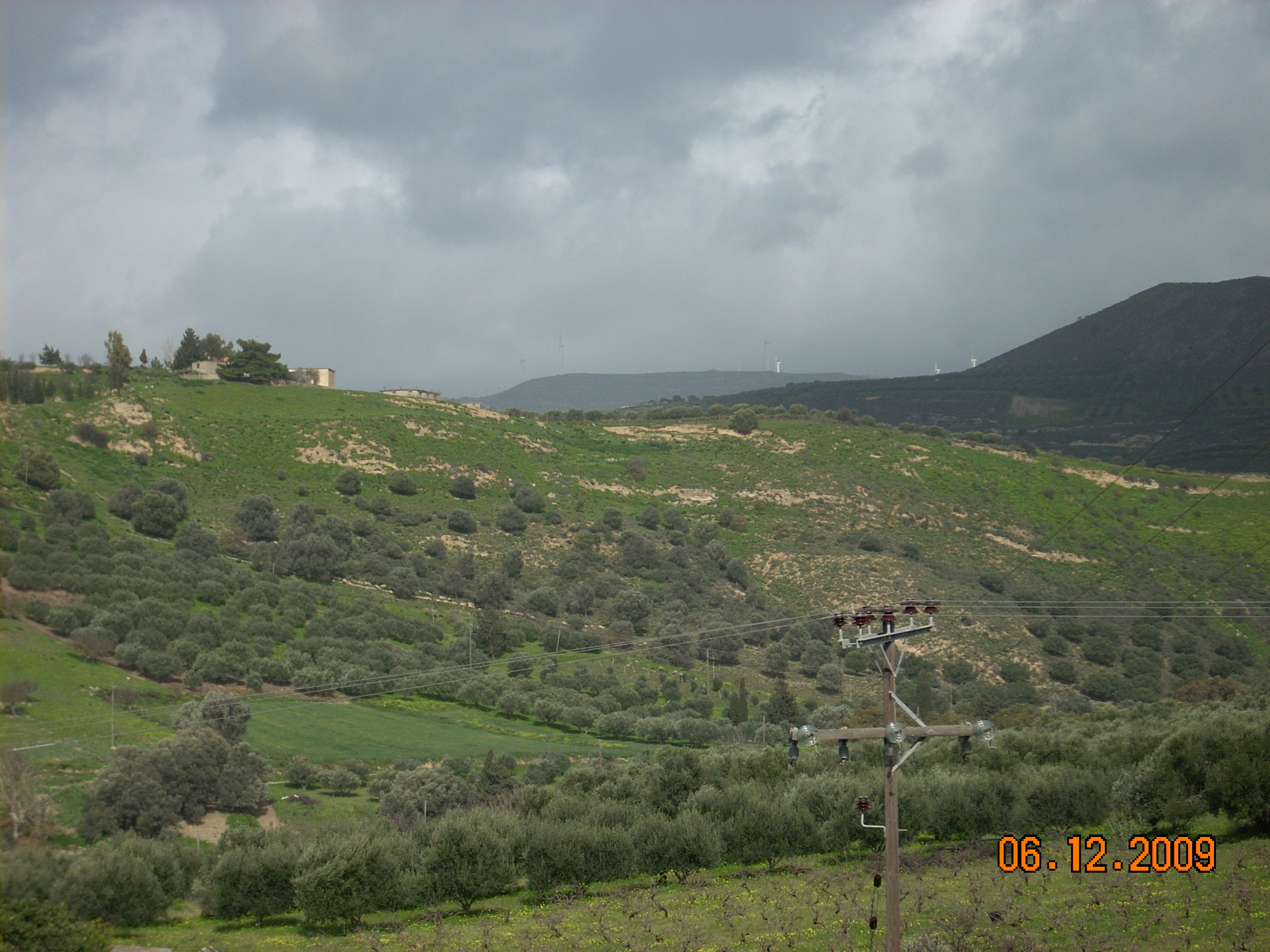 Προς την Αγ Βαρβαρα στο βάθος